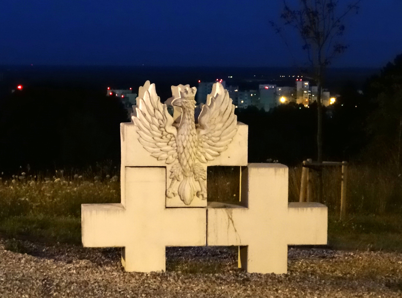 Brama do Nieba - ostatnia stacja drogi krzyżowej w Dolinie Śmierci w Bydgoszczy. Element Kalwarii Bydgoskiej - Golgoty XX wieku